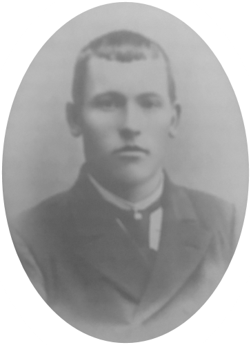 Ordfører Hans Bakke (1880-1958)